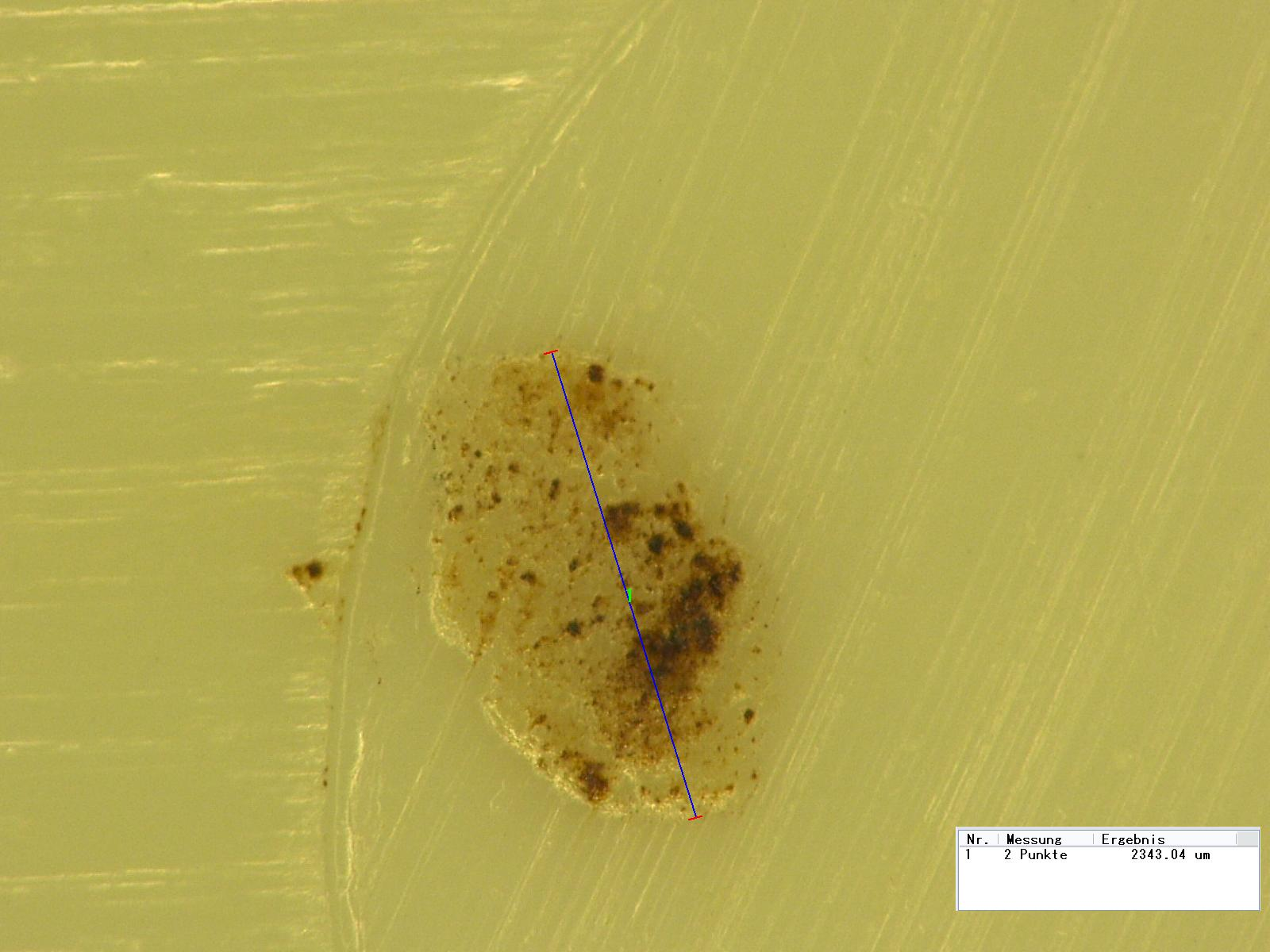 Abbildung einer Stippe bei 200facher Vergrößerung unter einem Auflichtmikroskop der Firma Keyence